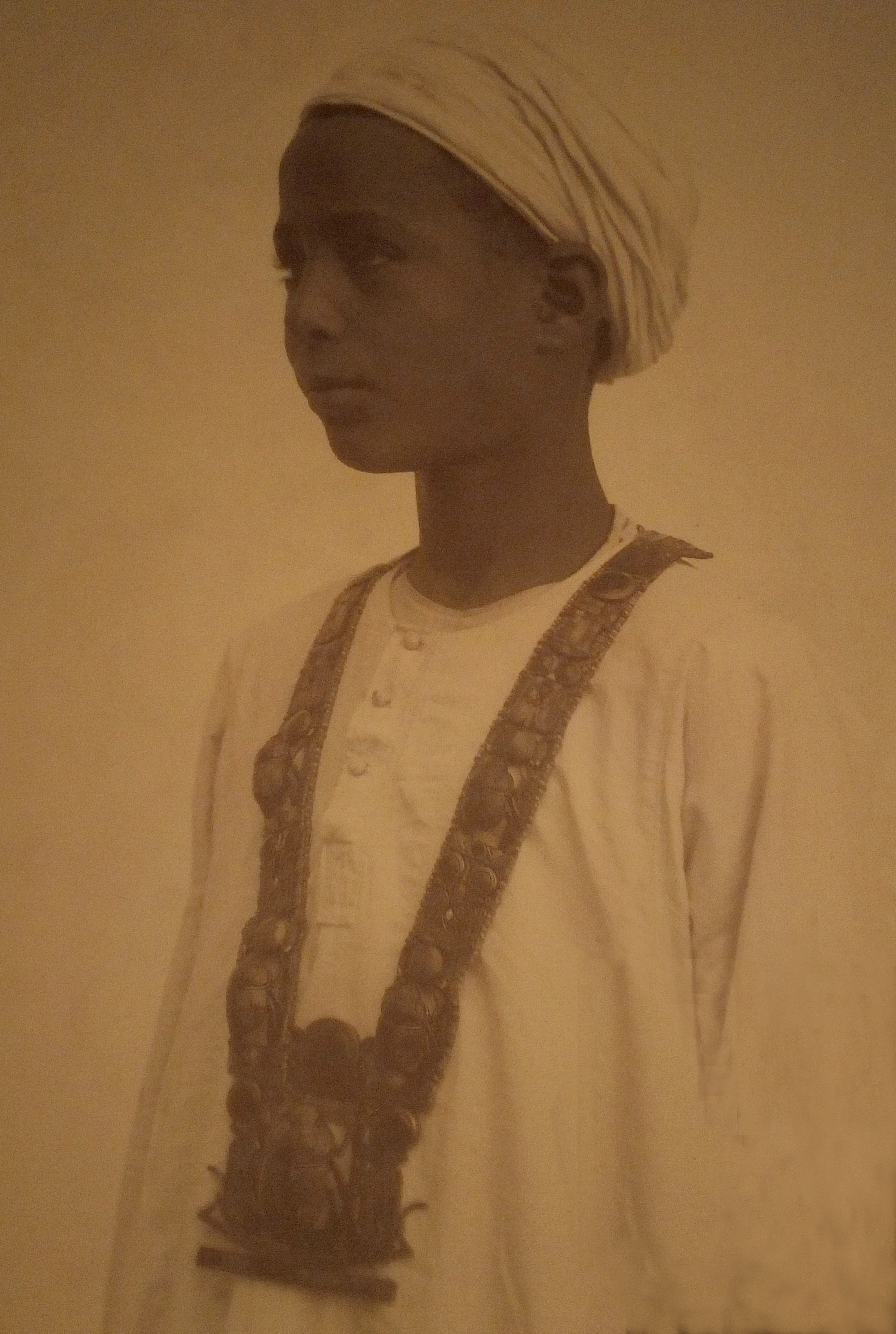 Le jeune Hussein Abdel-Rassoul, porteur d'eau sur la fouille de Howard Carter et qui aurait été celui qui a découvert la première marche du tombeau de Toutânkhamon le 9 novembre 1922. Autour de son cou un collier provenant du trésor. Photographie de Harry Burton, reproduite lors de l'exposition "Toutânkhamon, le trésor du pharaon" mars-septembre 2019, Grande halle de la Vilette, Paris.